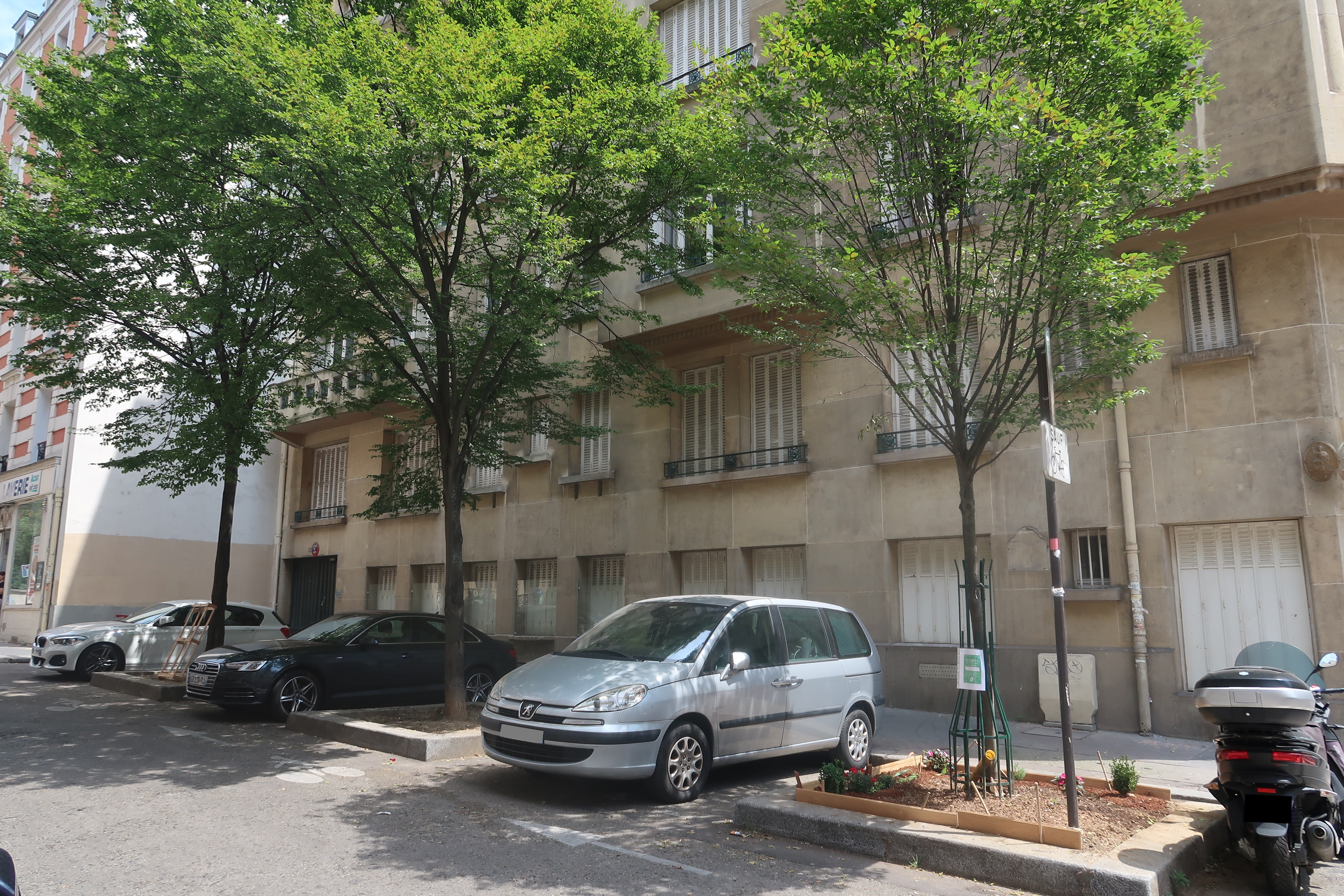 Rue Pétrarque, au croisement avec la rue Scheffer (Paris, 16e).